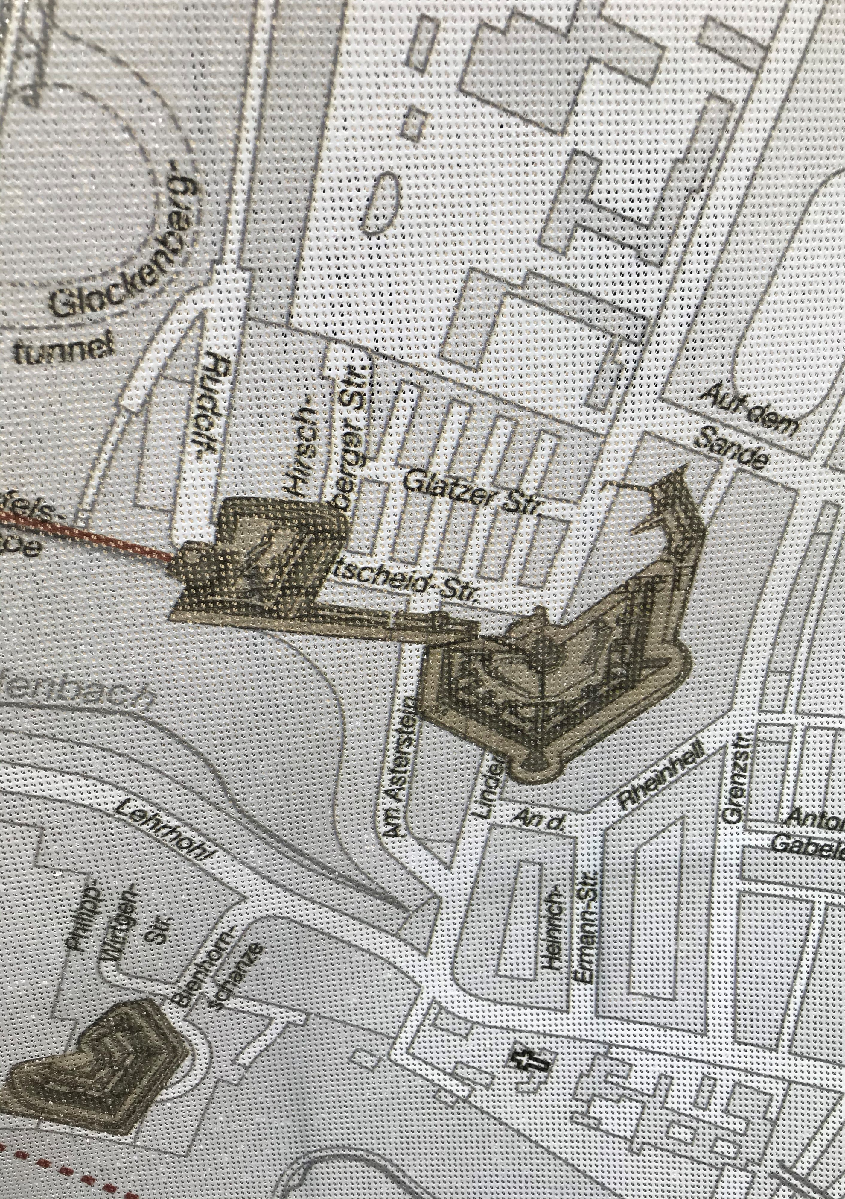 Das Foto zeigt eine Aufnahme eines Ausschnitts eines Plakats, das durch die Stadt Koblenz anlässlich des "Spatenstichs Großfestung Koblenz" im Jahr 2018 am Zaun des Fort Astersteins angebracht wurde . Zu sehen ist auf dahintergelegter heutiger Bebauung das Werk Glockenberg, das Fort Rheinhell mit dem Verbindungsgraben zwischen beiden Bauten sowie die Bienhornschanze und ein Teil der Teufelstreppe.